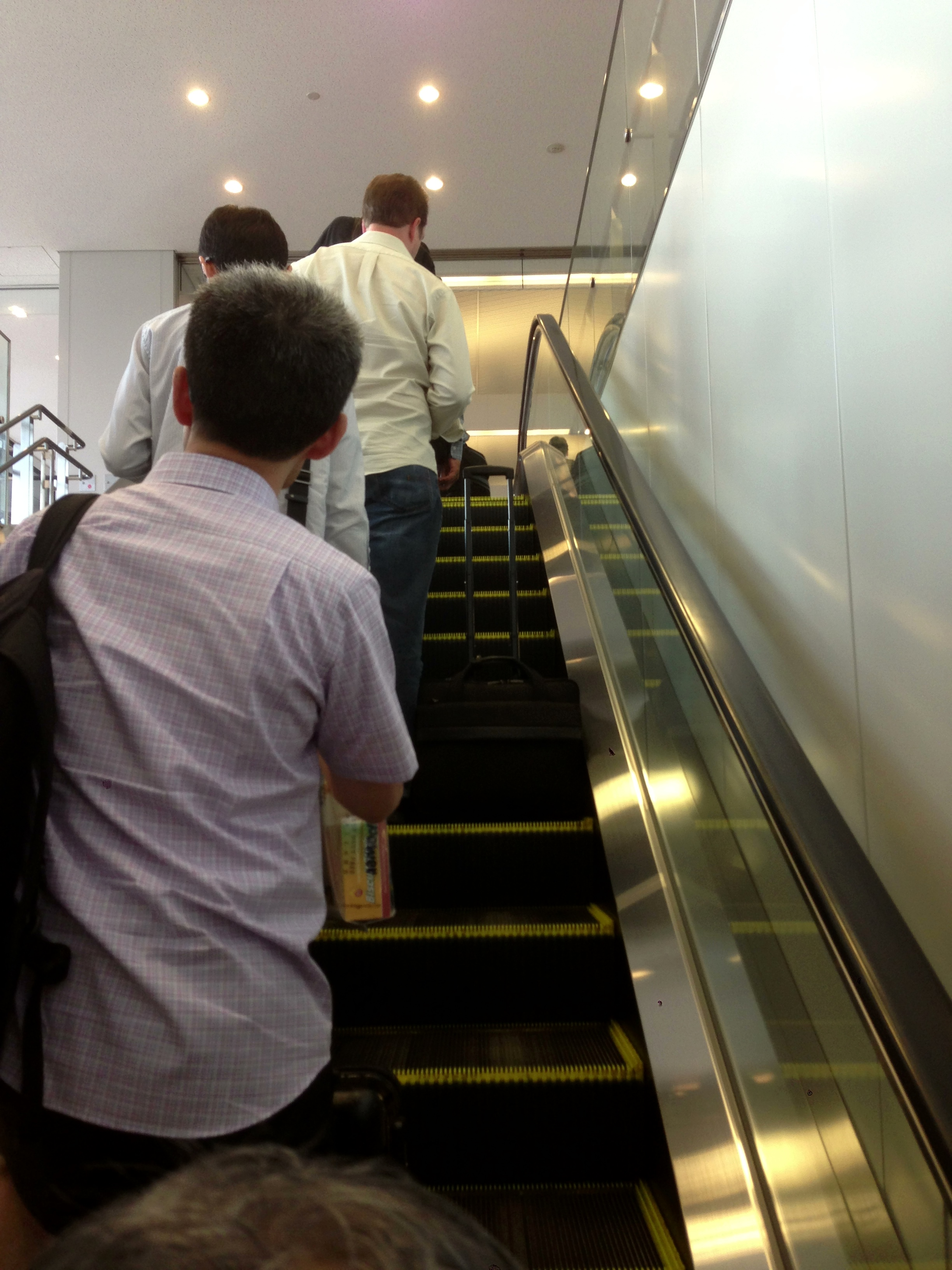 Escalator etiquette [1] エスカレーター、関西なぜ「右立ち」